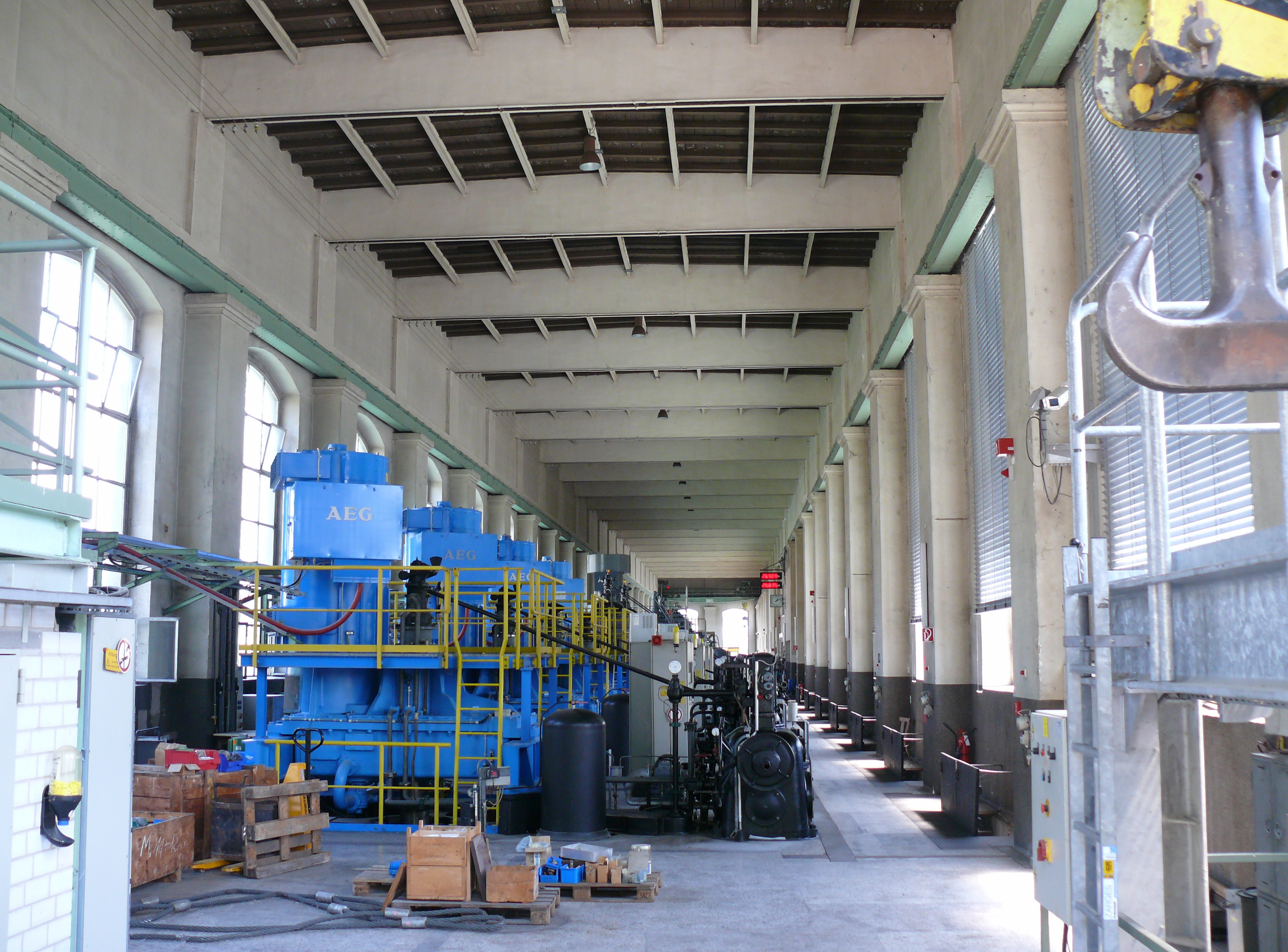 Blick ins Innere des alten Kraftwerkes Rheinfelden. Im Vordergrund Maschine 20.